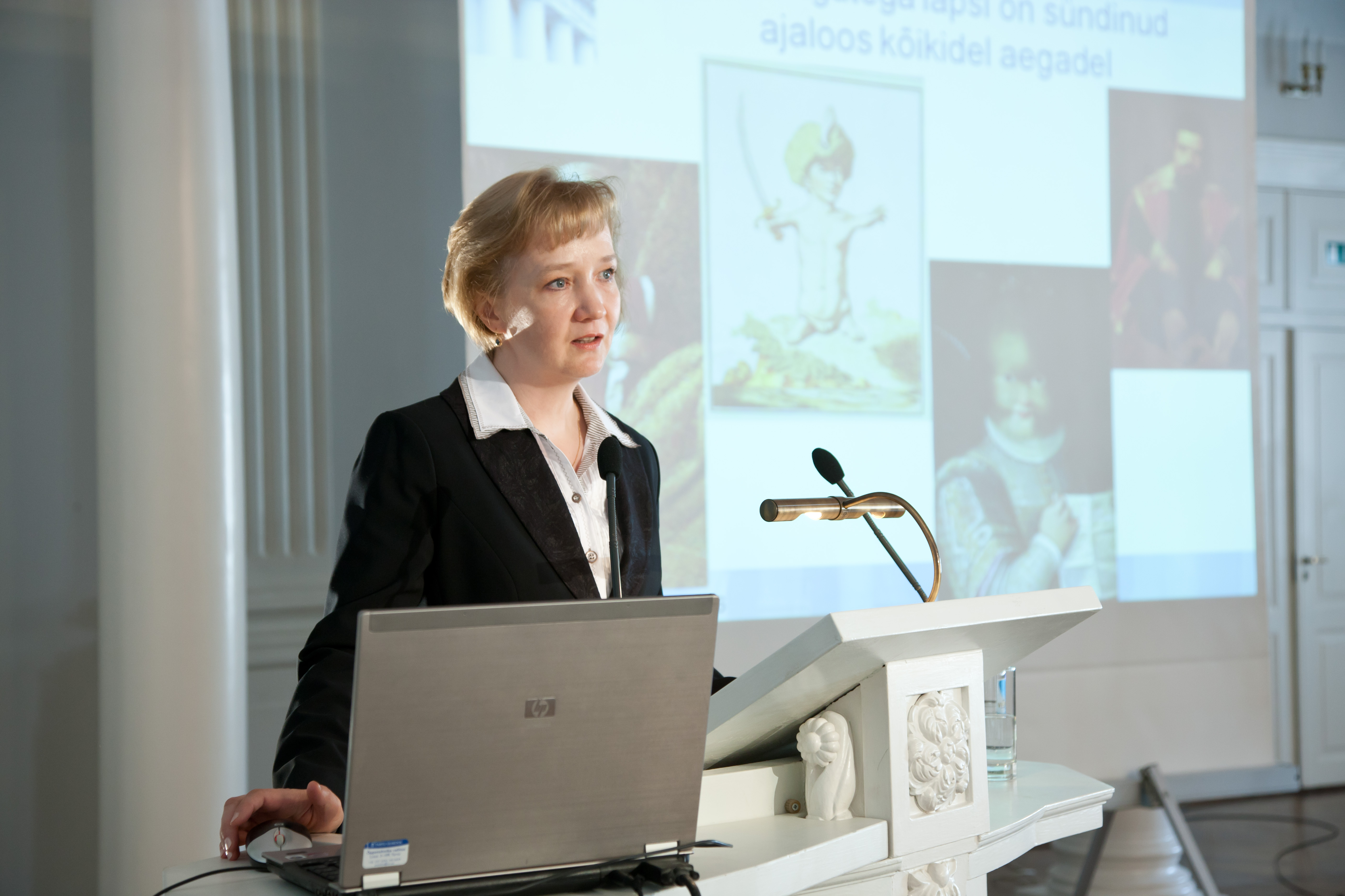 24. mail 2011 pidas Tartu Ülikooli TÜ kliinilise geneetika professor Katrin Õunap TÜ aulas inauguratsiooniloengu teemal "Arstikunst ja genoomiuuringud".